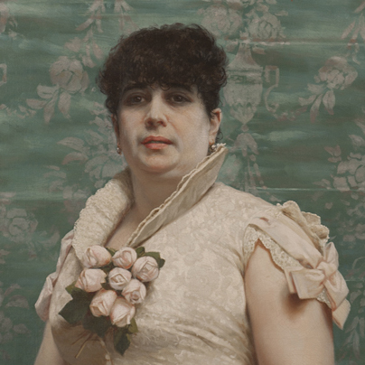 Detalle del retrato de Carlota Ferreira (1883) de Juan Manuel Blanes